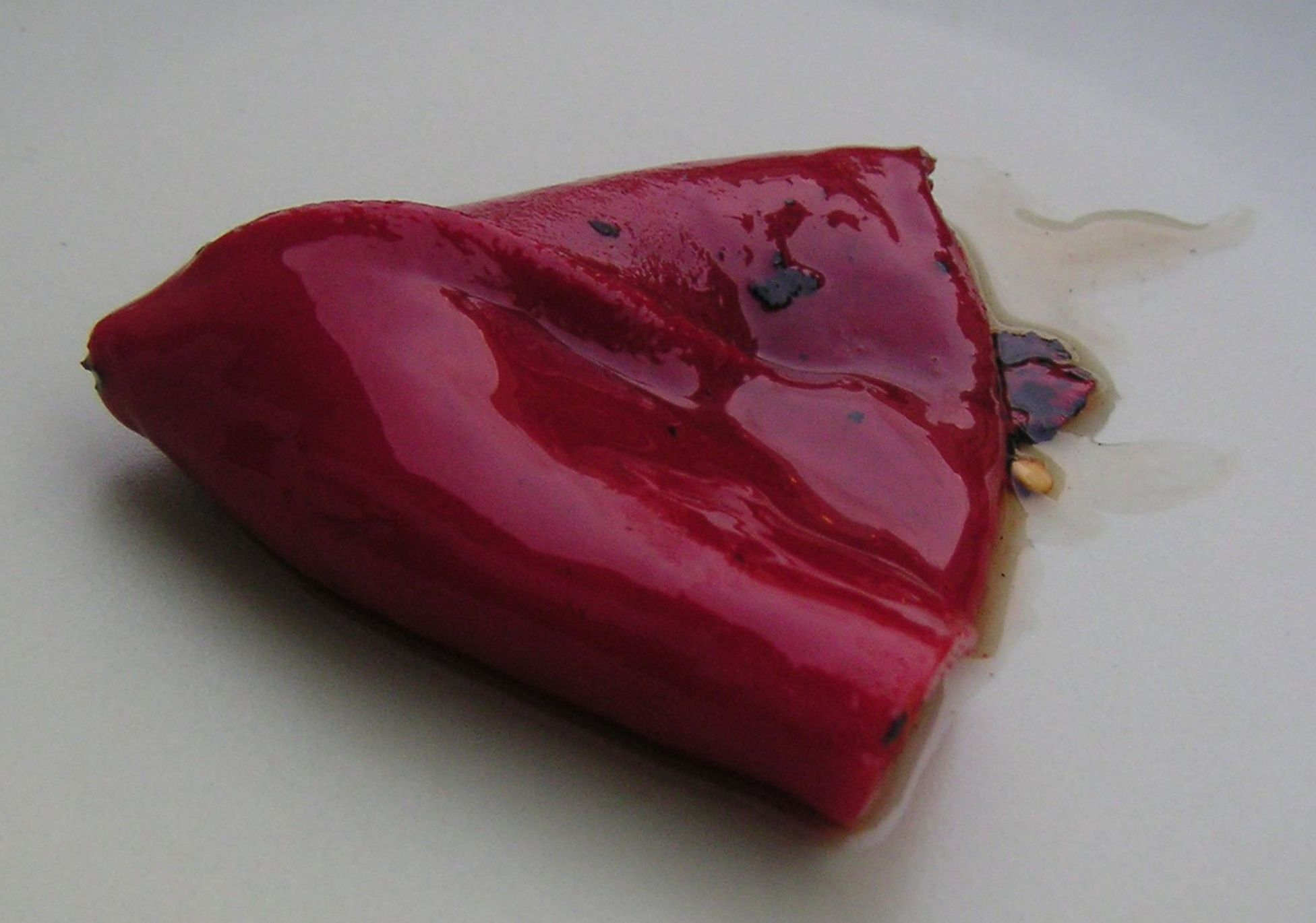 un pebrot del piquillo escalivat i en conserva